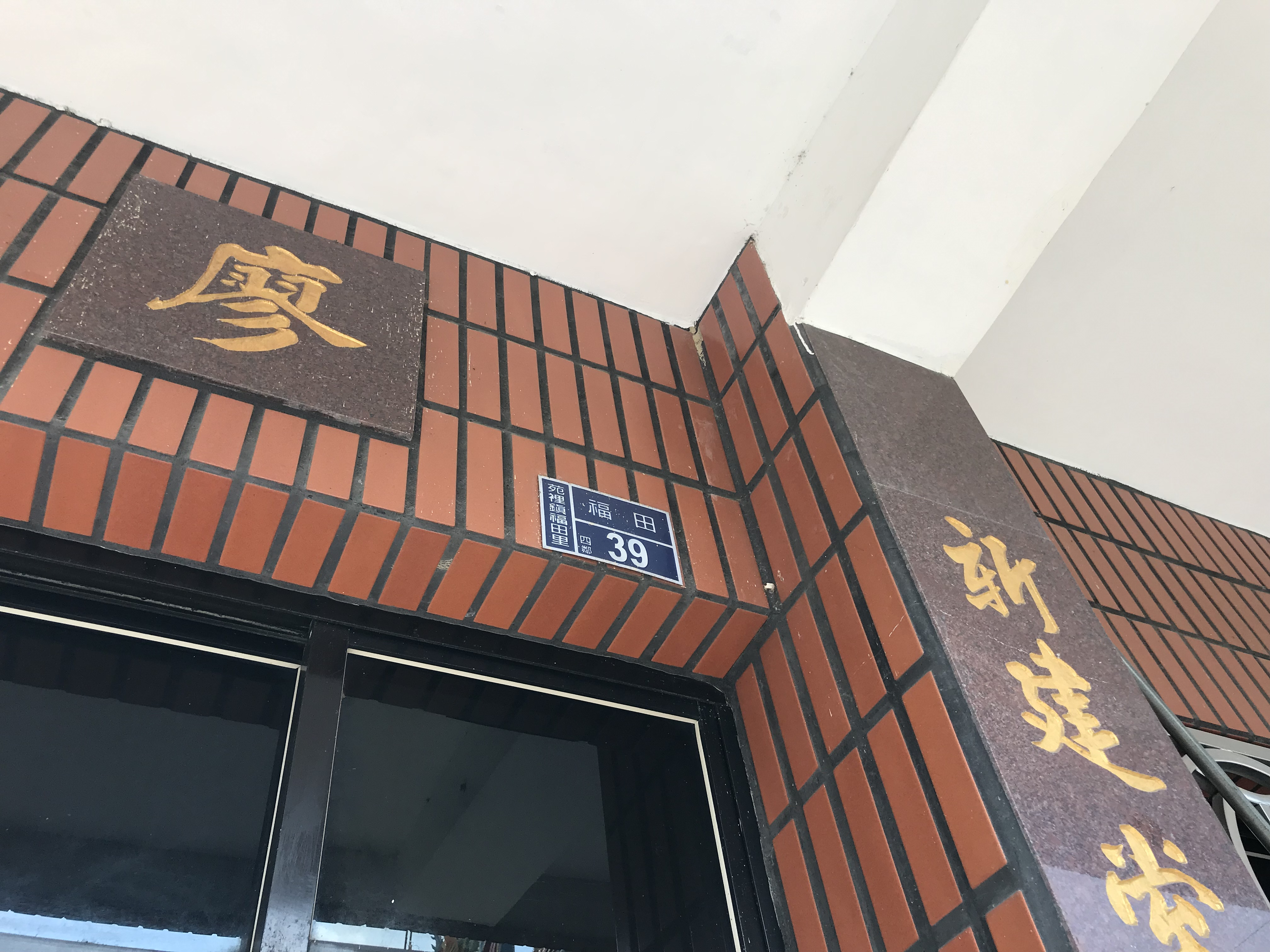 中文（台灣）: 廖府先生廟門牌